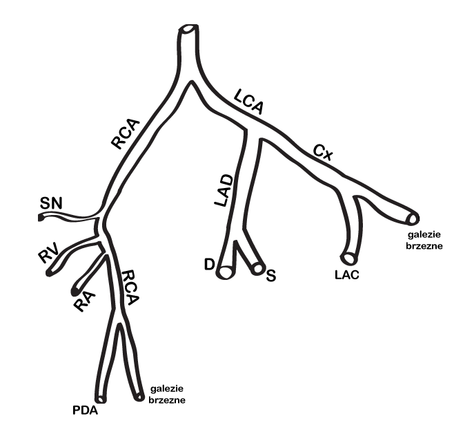 Schemat naczyń wieńcowych